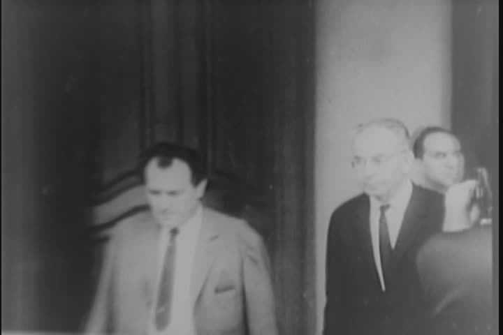 Vasiľ Biľak a Gustáv Husák.